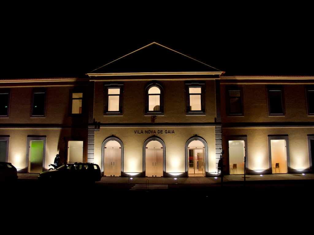 Tipo: EP (Estação) Local: Vila Nova de Gaia [Linha do Norte, PK 332] Data e hora: 2 de Novembro de 2008 [21h26]